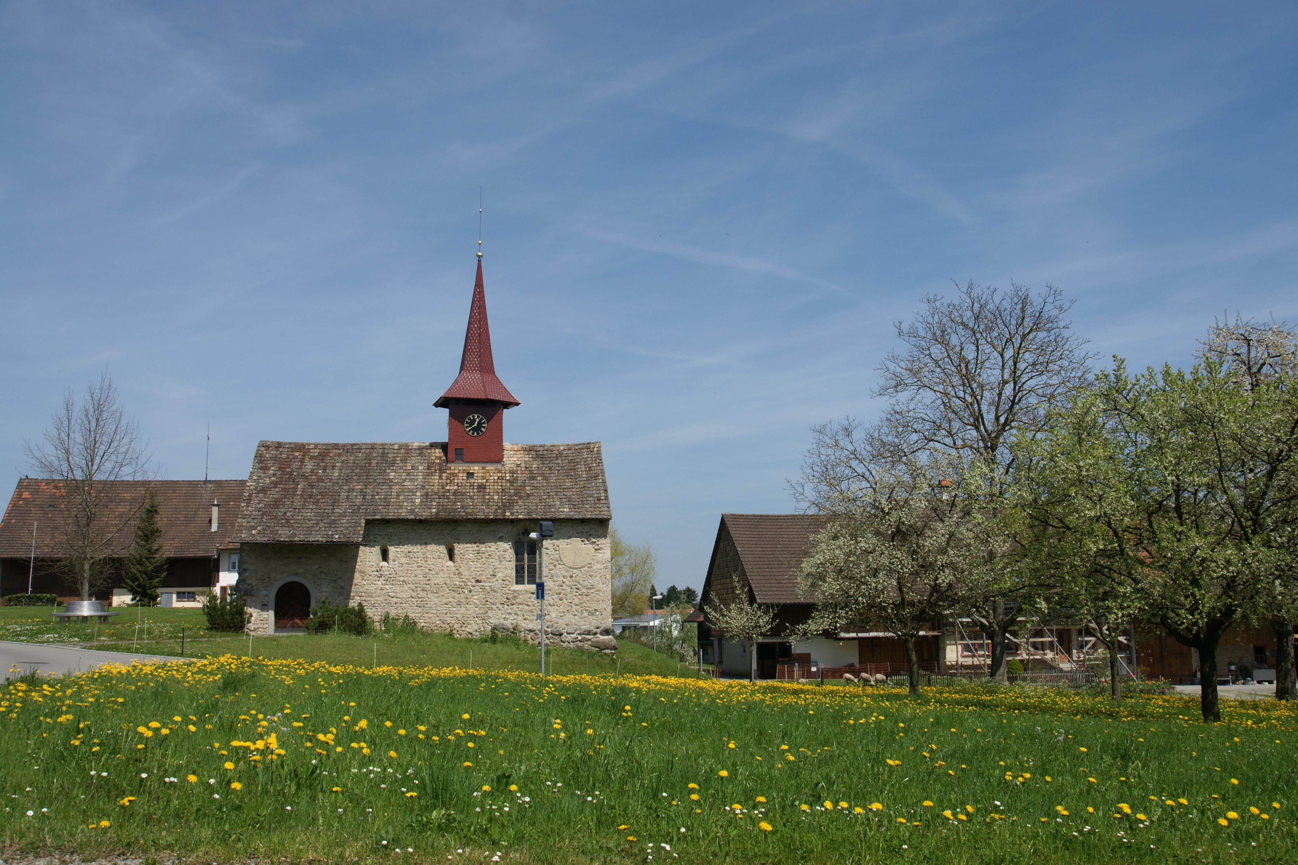 Gerlikon TG Aufnahme vom 27.04.2008 12:37 1/320 s - f/9 - ISO 100 - 22 mm - 33 mmKB Aufnahmestandort: 545 m - 708409 / 266088 (47° 32′ 11.68″ N, 8° 52′ 42.53″ E Decimal 47.536576°, 8.878482°)